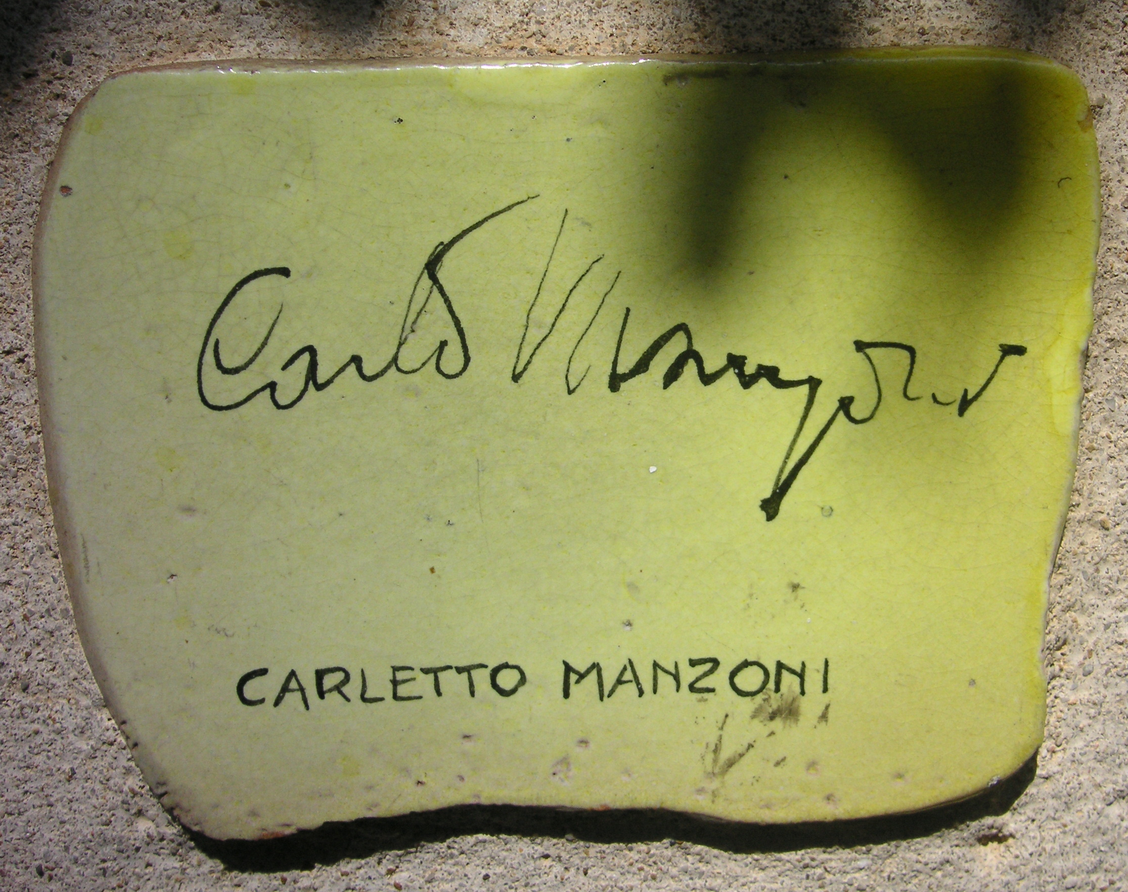 Piastrella autografata da Carletto Manzoni sul muretto di Alassio